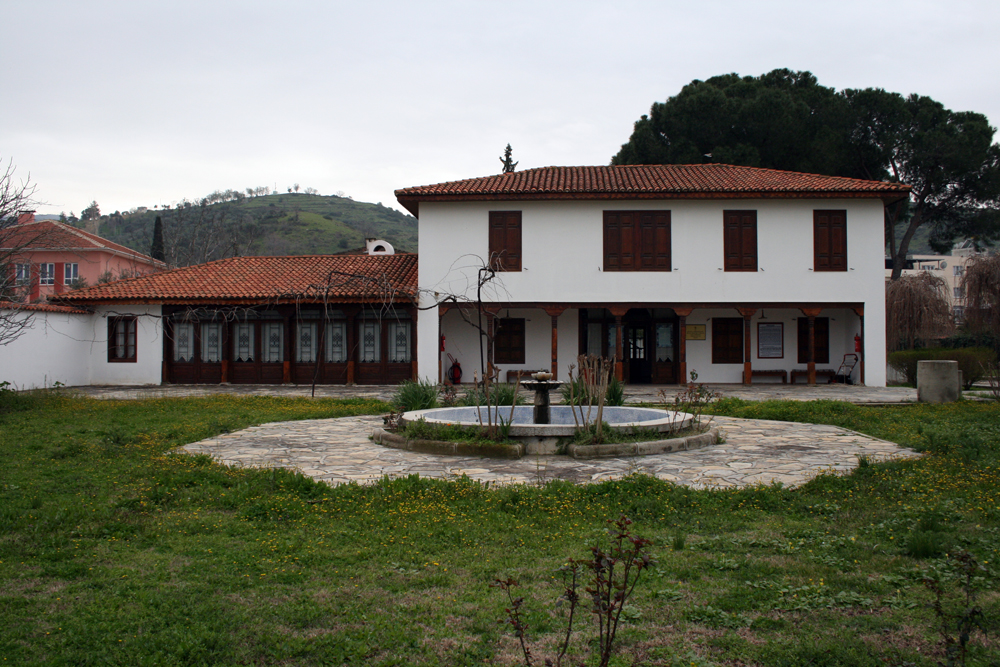 Yörük Ali Efe Müzesi